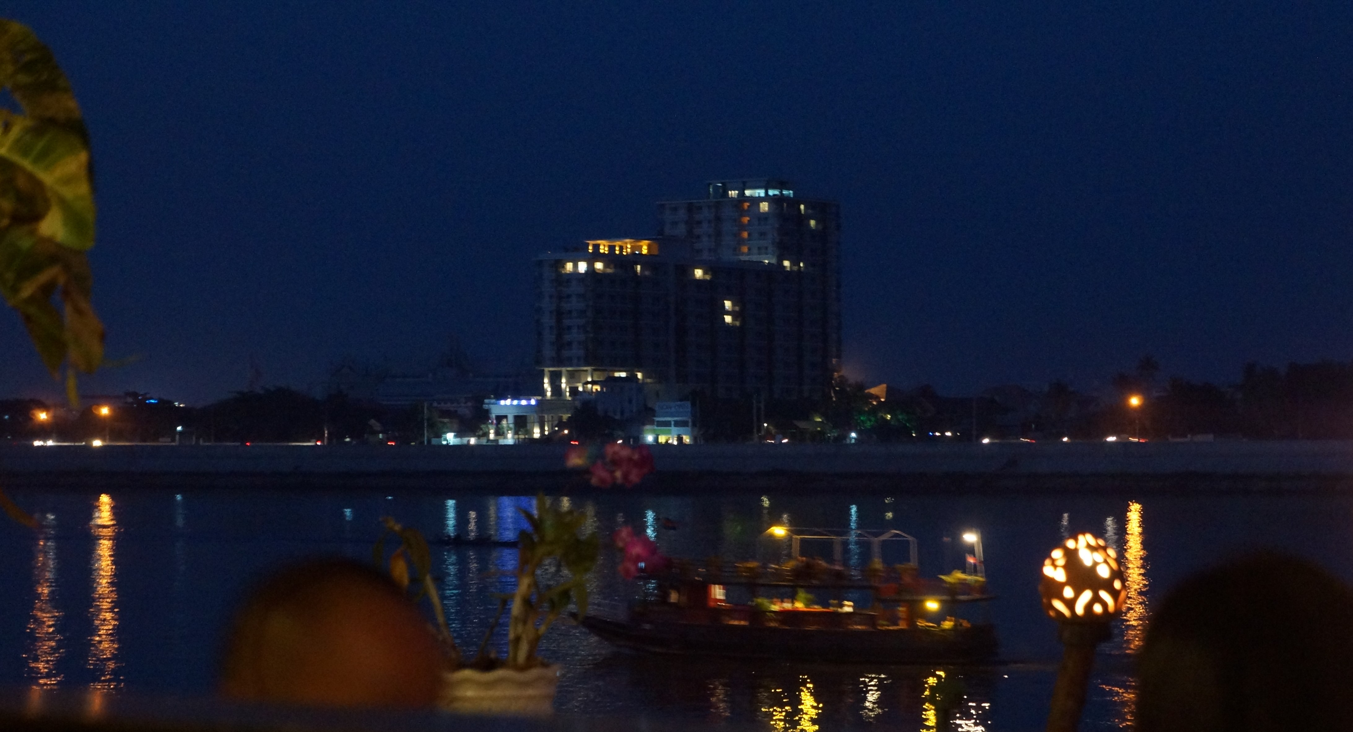 Sur le Mékongà Phnom Penh.- Cambodge